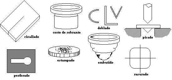 Procesos mas comúnes realizados en un troquel